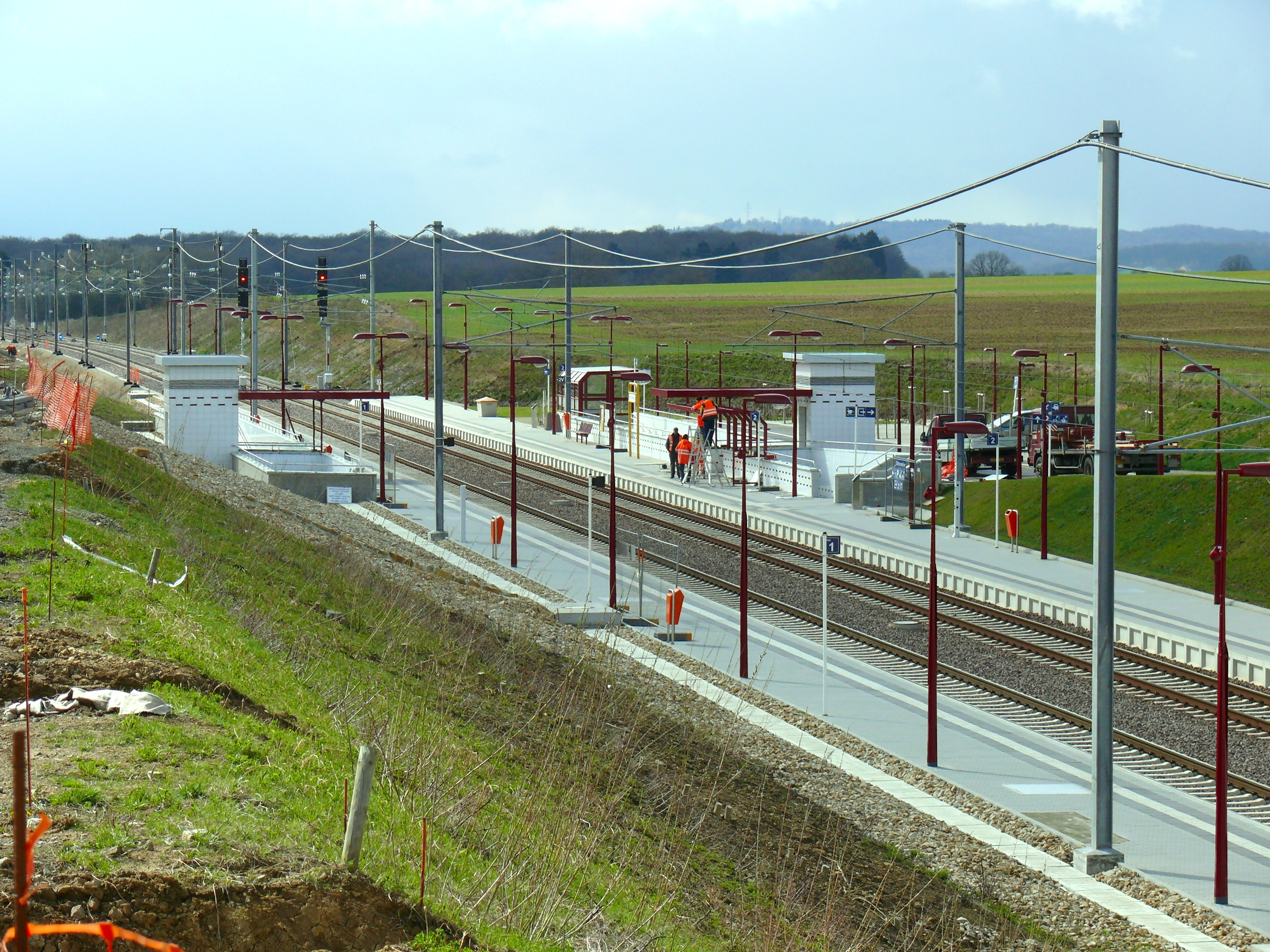 Sujet: Gare Schuller, 2010, nom Ëmbau; Source: Eege Foto vum Pecalux; Lizenz: CC-by-sa